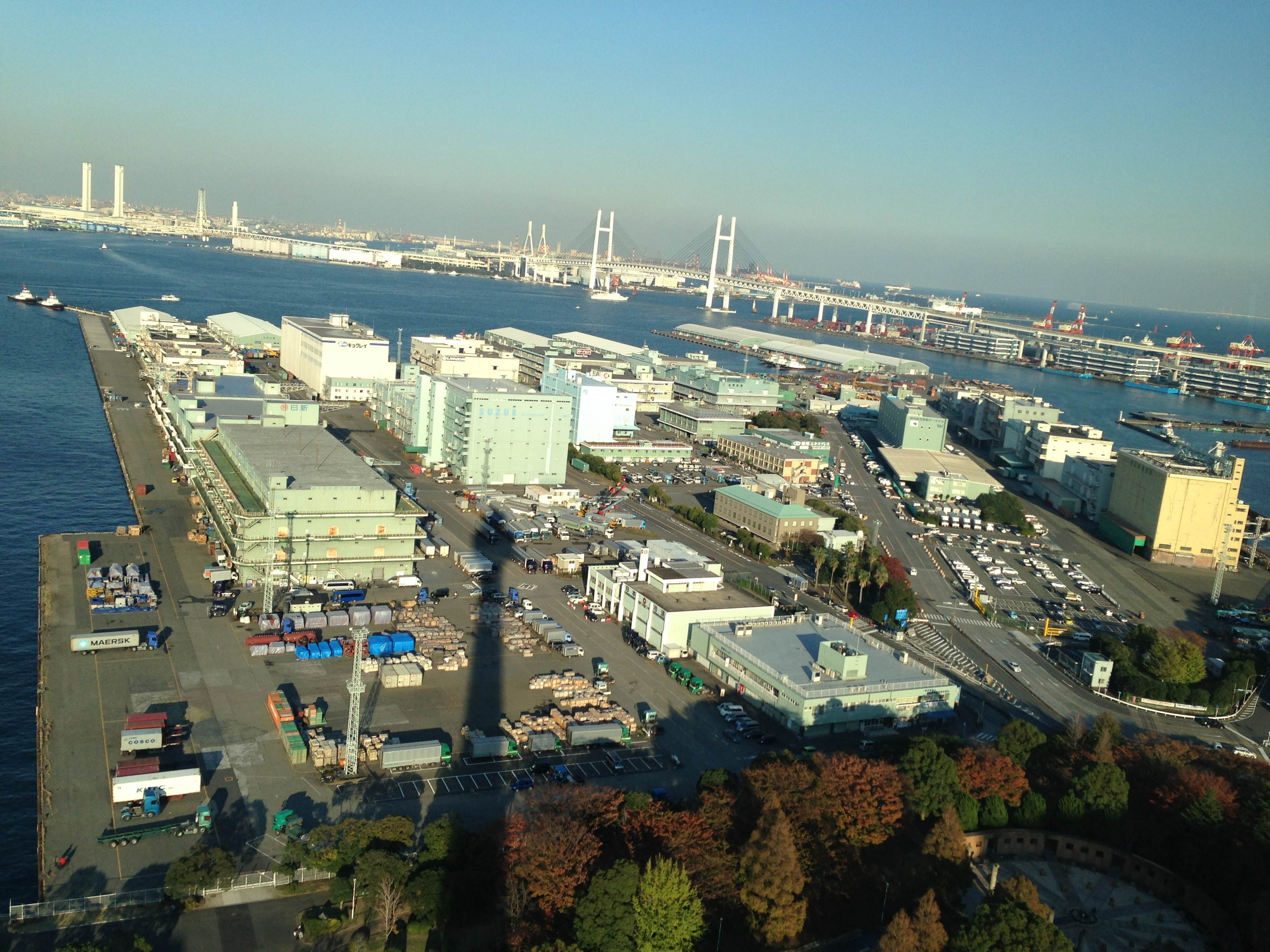 横浜マリンタワーの展望台より山下埠頭を見る。